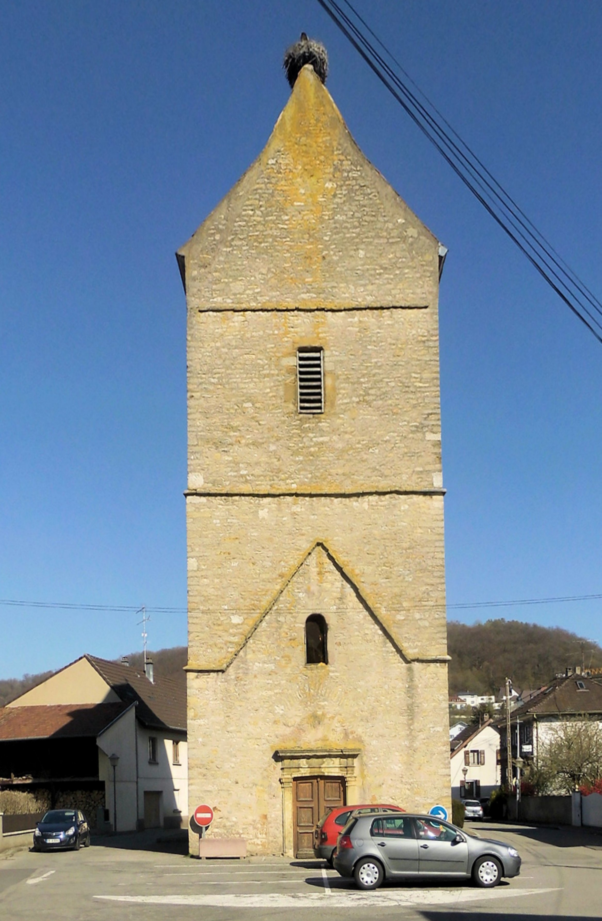 Les vestiges du clocher de la chapelle Saint-Nicolas d'Illfurth